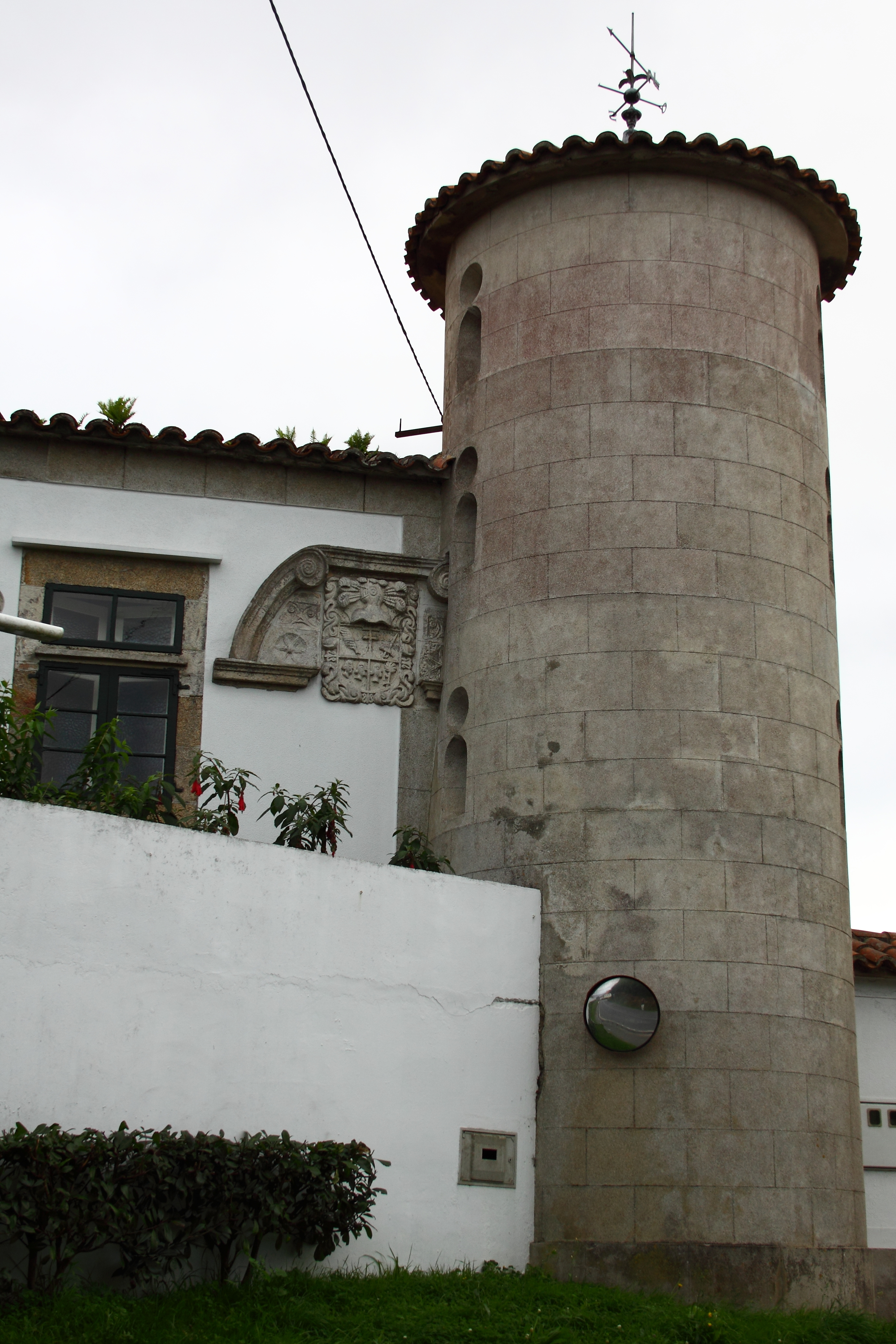 Torre de Lorbé, Oleiros